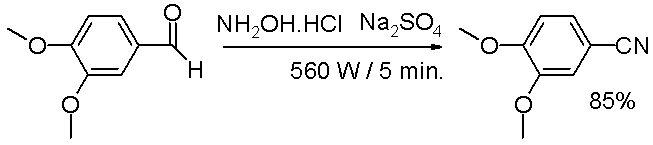 Aldehyde to nitrile conversion